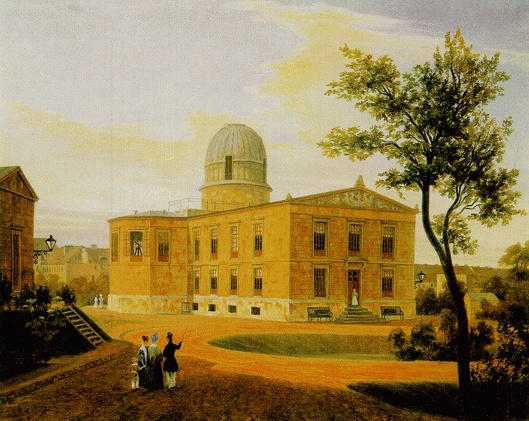 Carl Daniel Freydanck (1811-1887): "Die Neue Sternwarte in Berlin", oil, 1838. Standort der Sternwarte: Lindenstr., Kreuzberg.